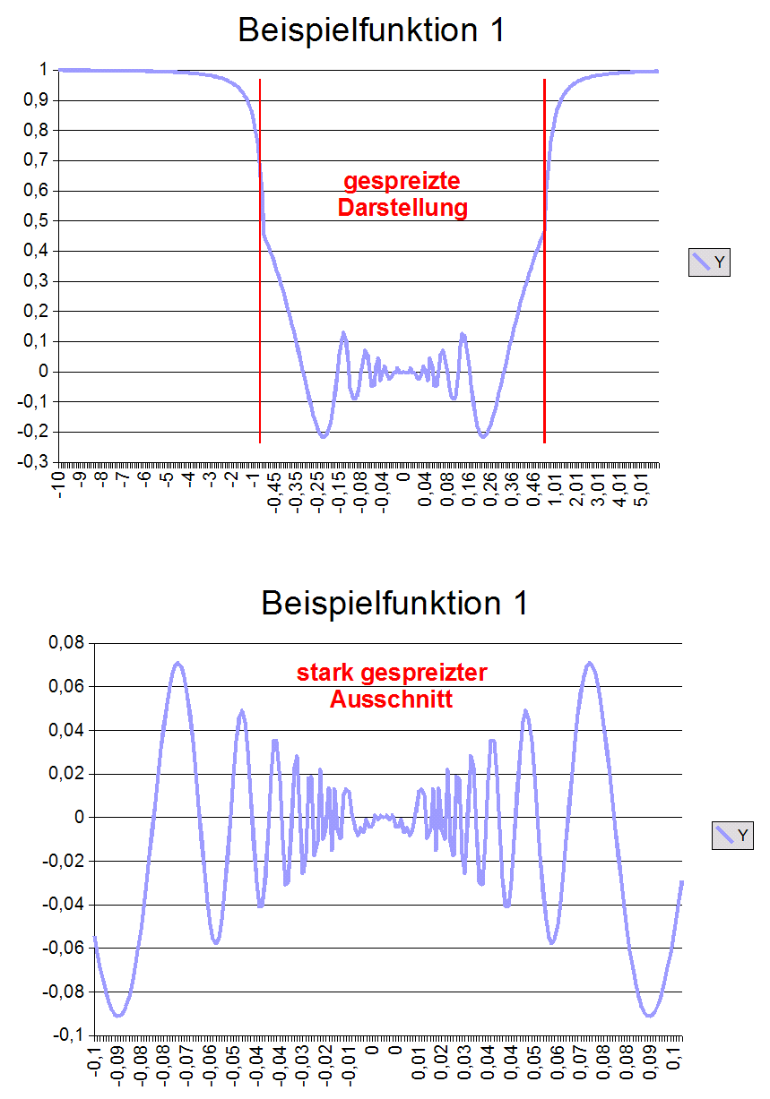 Unbeschränkte Variation